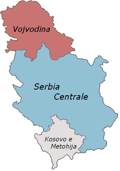 Description: Suddivisioni della Serbia